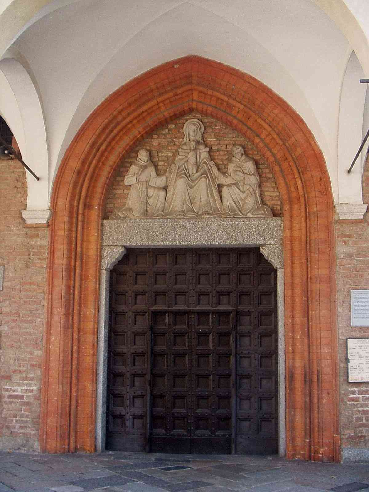 Ingresso alla chiesa di Santa Maria delle Grazie in Monza. Sopra l'architrave gruppo scultoreo in marmo raffigurante la Madonna in trono con il Bambino affiancata alla sua destra da San Francesco e alla sua sinistra da San Bernardino - opera del 1956 dello scultore cremonese Dante Ruffini (1905-1963)